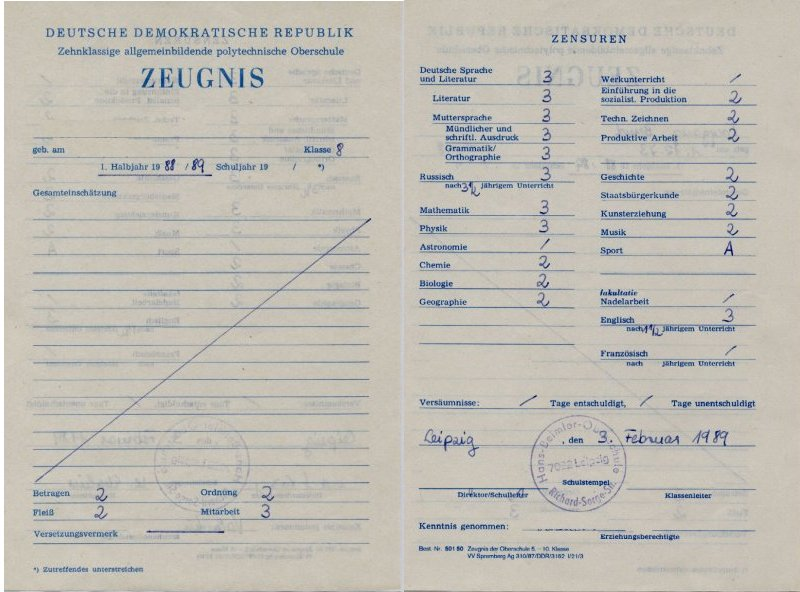 DDR Zeugnis mit Zensuren.Namen und Unterschriften wurden entfernt.